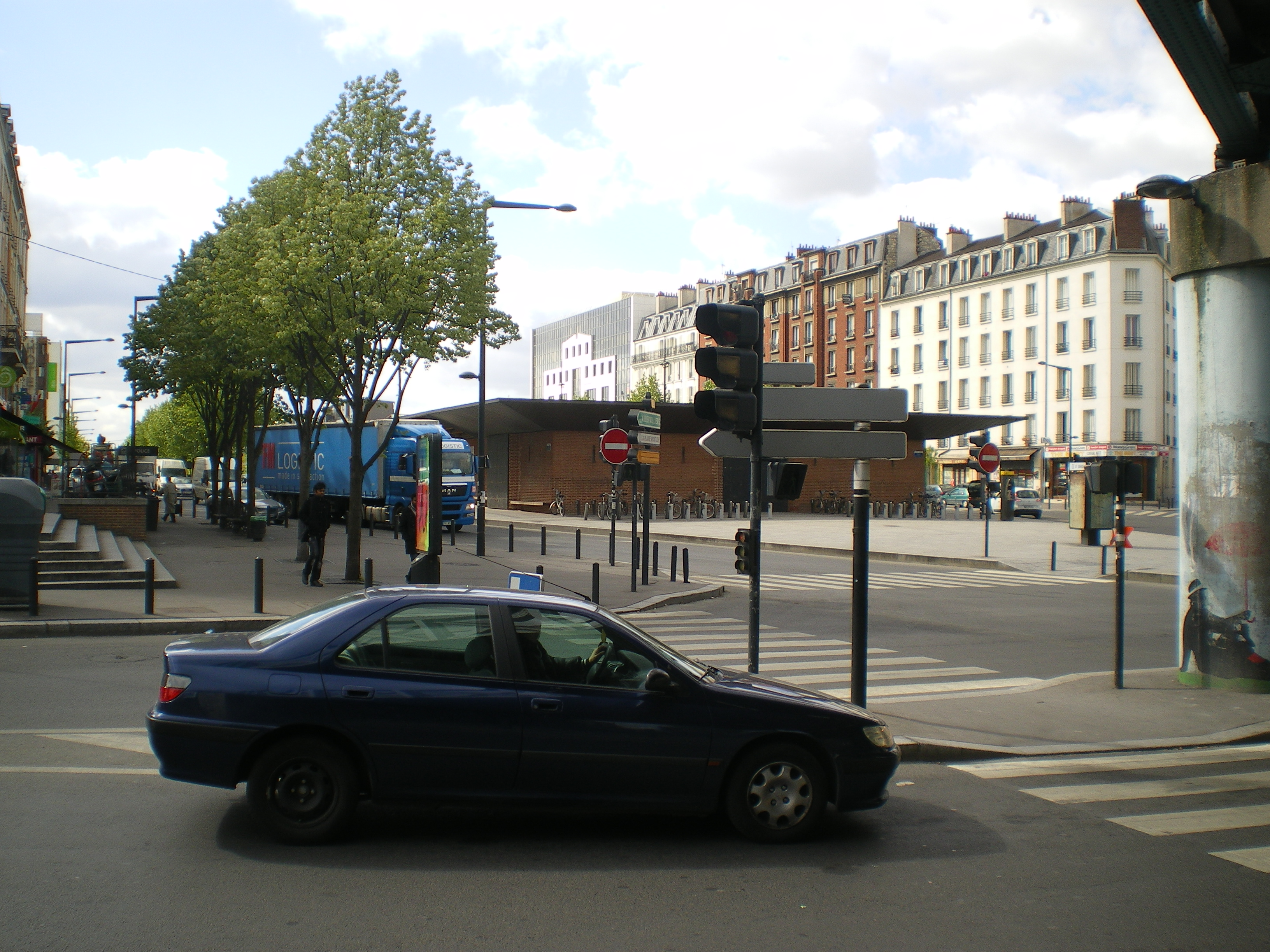 Installation de ventillation du tunnel du Landy